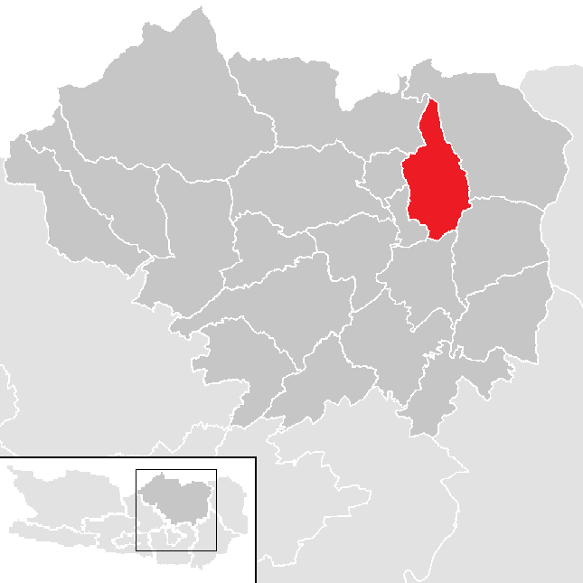 Bezirk Sankt Veit an der Glan